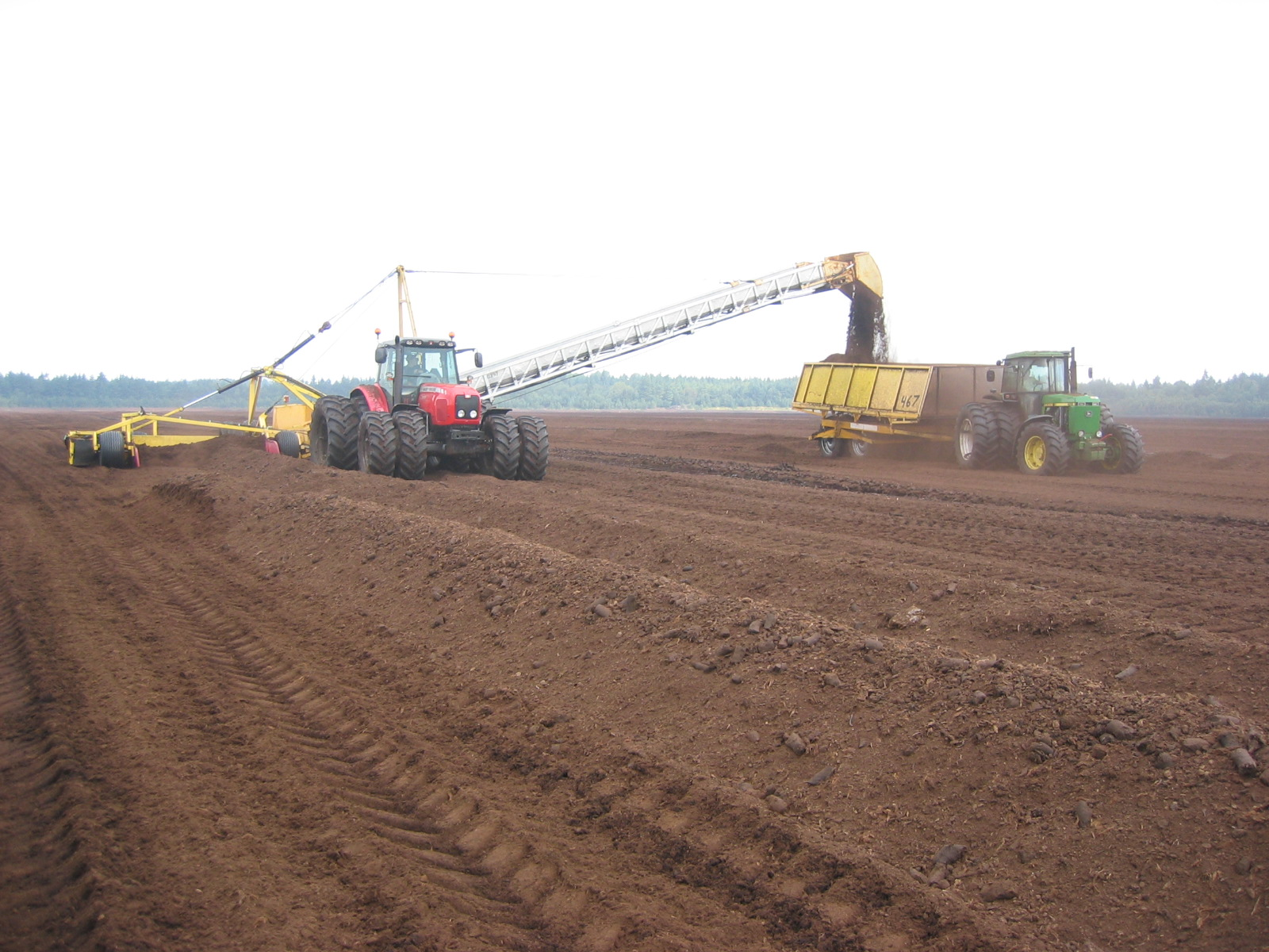 Brytning av frästorv på Miltramosse utanför Ljungby.